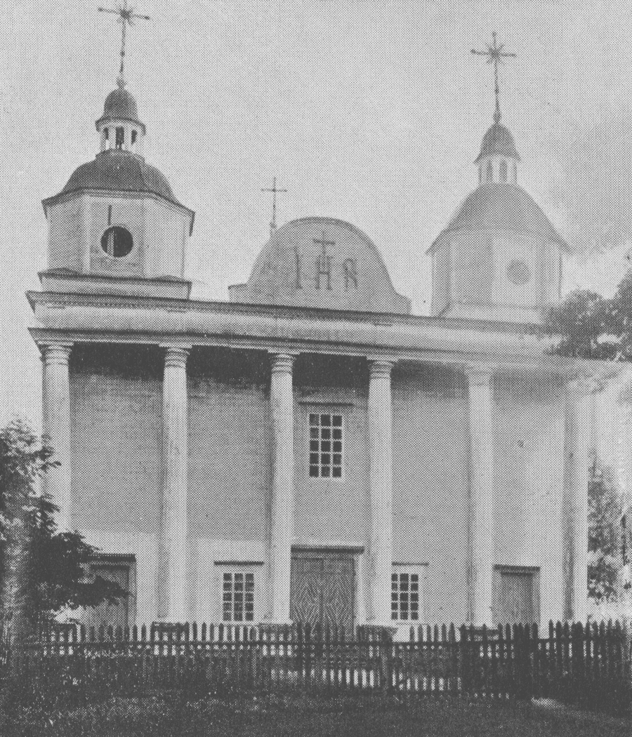 Костьол у Чорнобилі